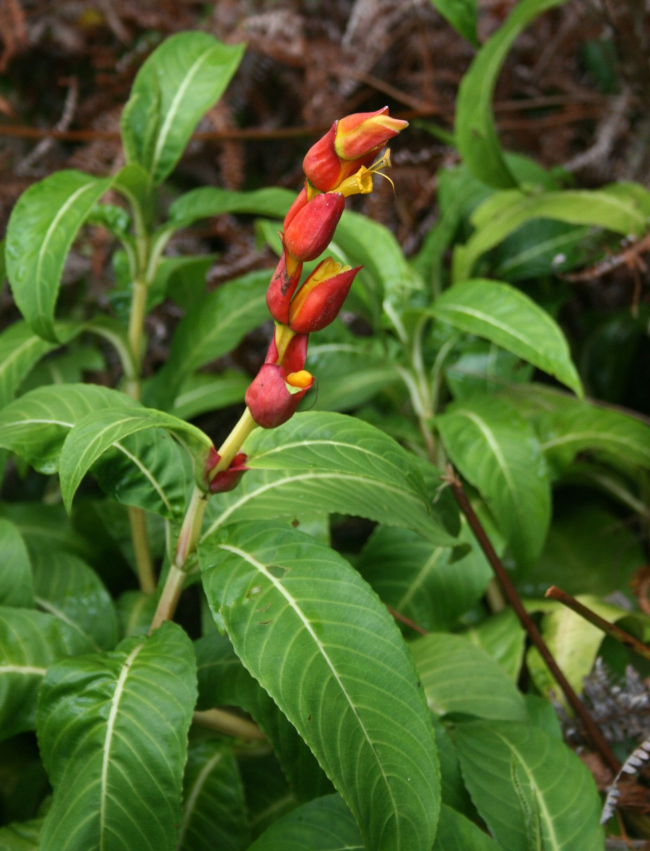 Sanchezia speciosa, Akanthusgewächse (Acanthaceae) - Costa Rica: Prov. Puntarenas, La Gamba NW Golfito, nahe der "Esquinas Rainforest Lodge"